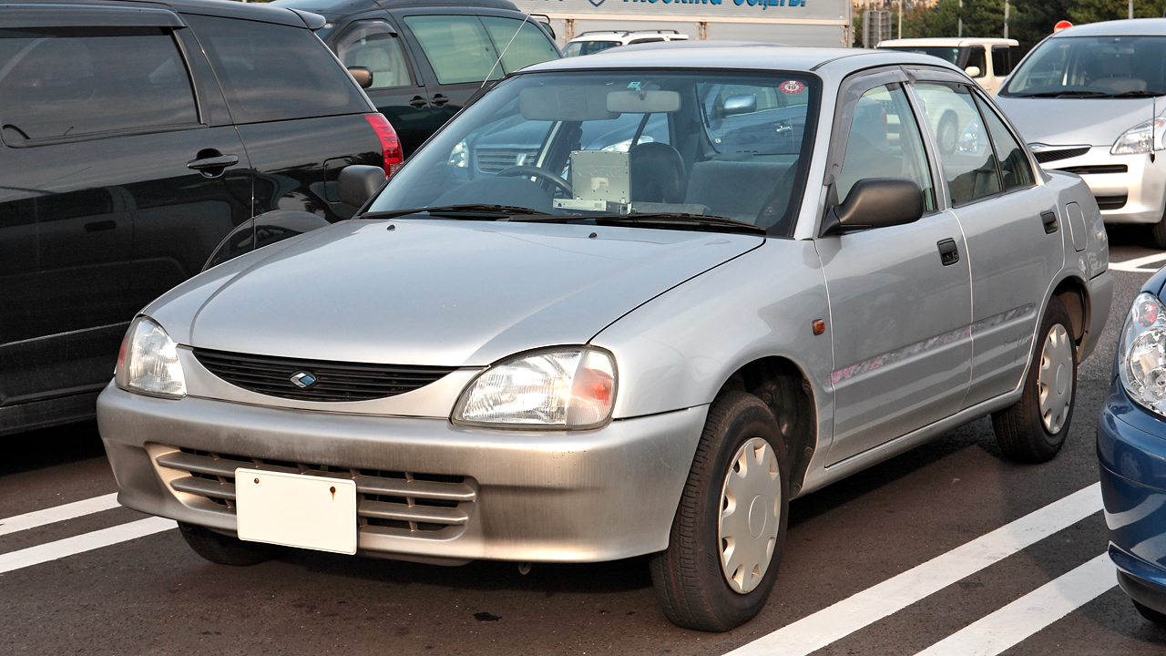 Daihatsu Charade Social 1.5 Pose ( G203S )